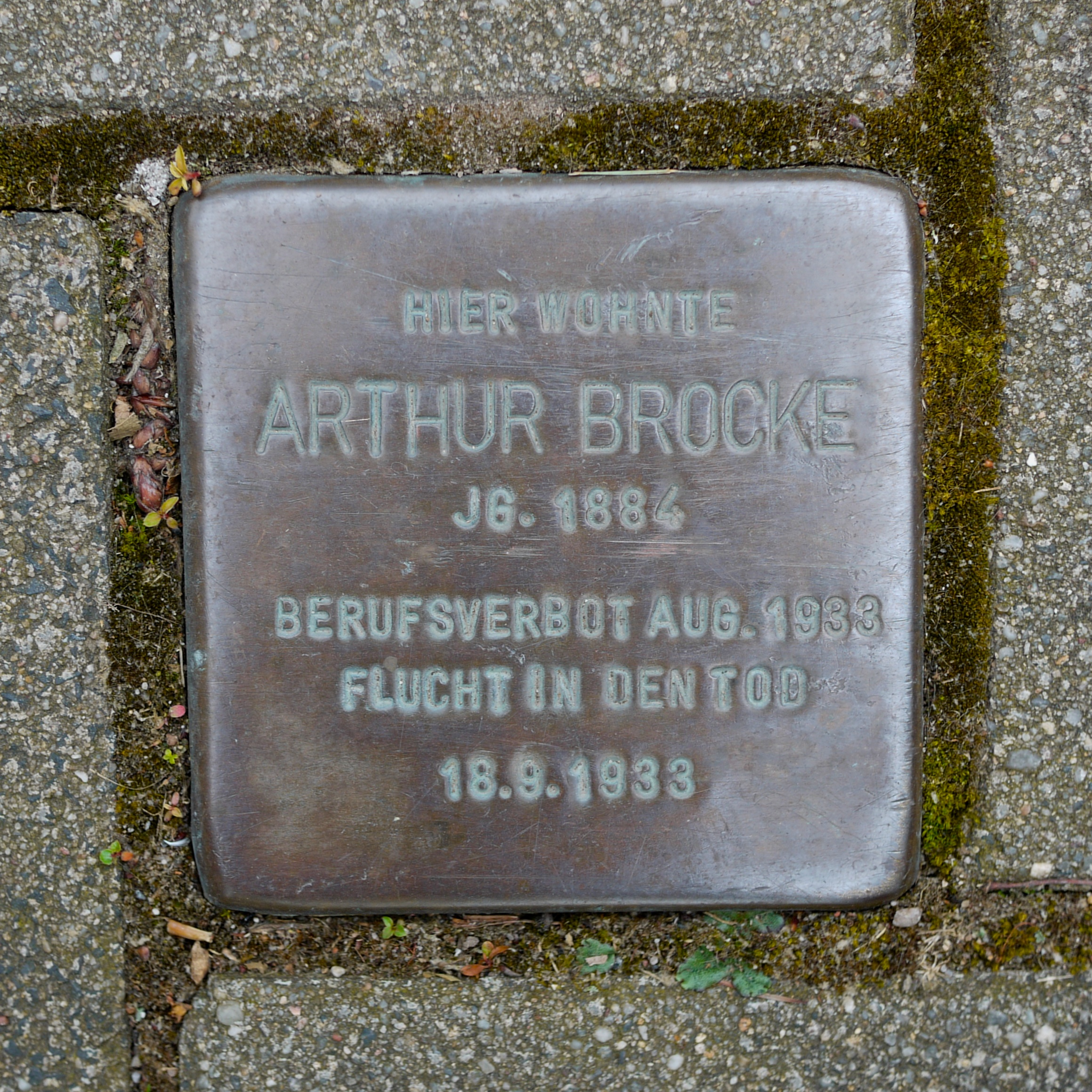 Stolperstein für Arthur Brocke, vor dem Haus Bismarckstraße 31, Mülheim an der Ruhr (Info-Seite der Stadt MH)